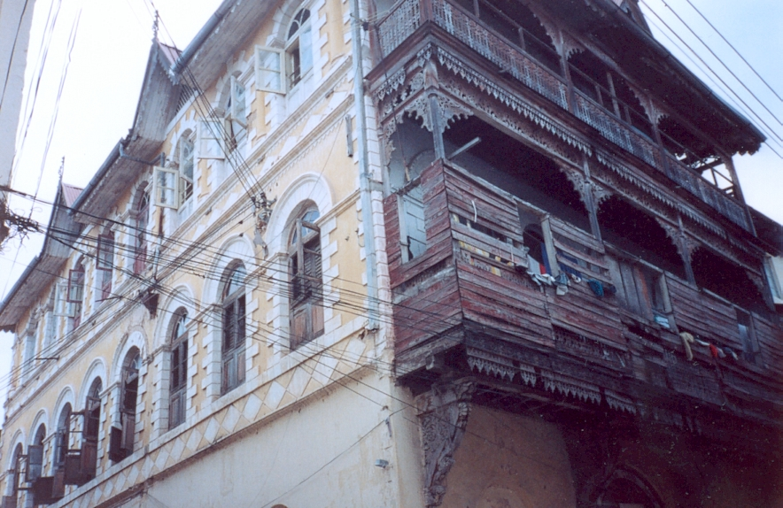 Vieux centre-ville de Mombasa au Kenya en 1990.